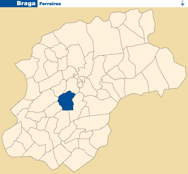 Localização de Ferreiros no concelho de Braga.